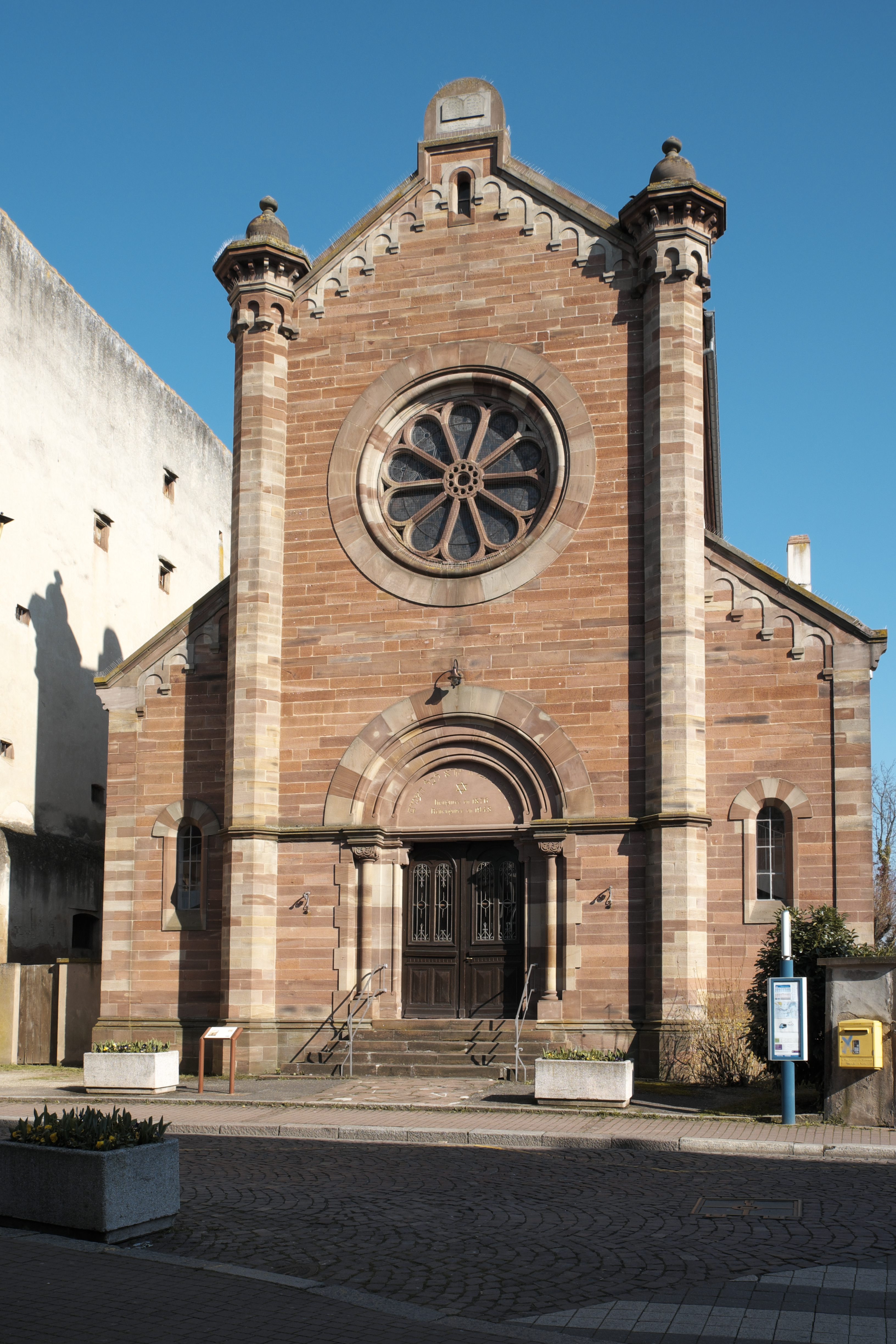 Synagoge (Obernai) in Obernai im Département Bas-Rhin in der Region Grand Est (Frankreich), Westfassade